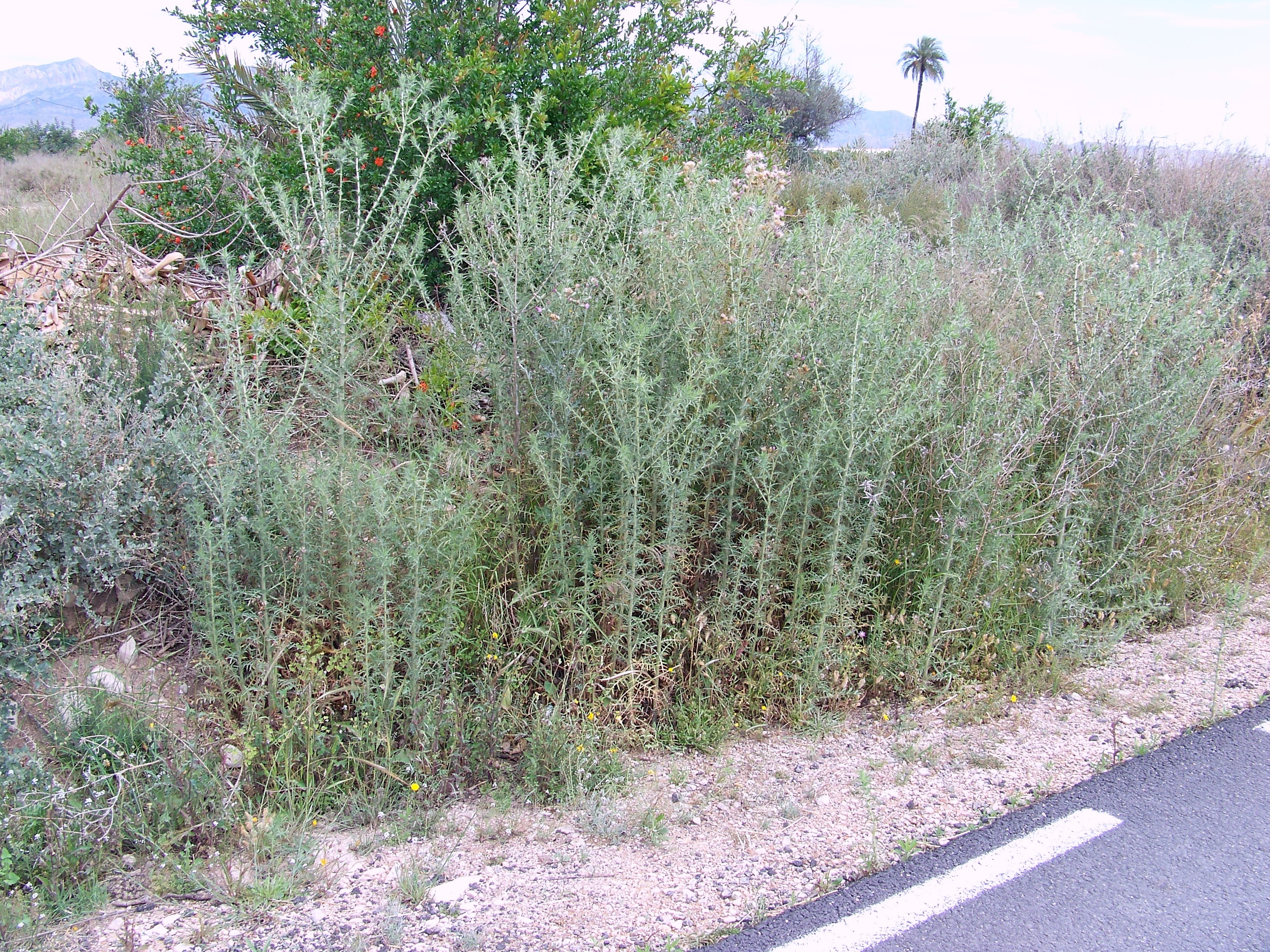 Carthamus lanatus - Vista general; preanthesis, individuos particularmente altos - Camino de Elche/Cañada de Orihuela, Albatera (Alicante, España)